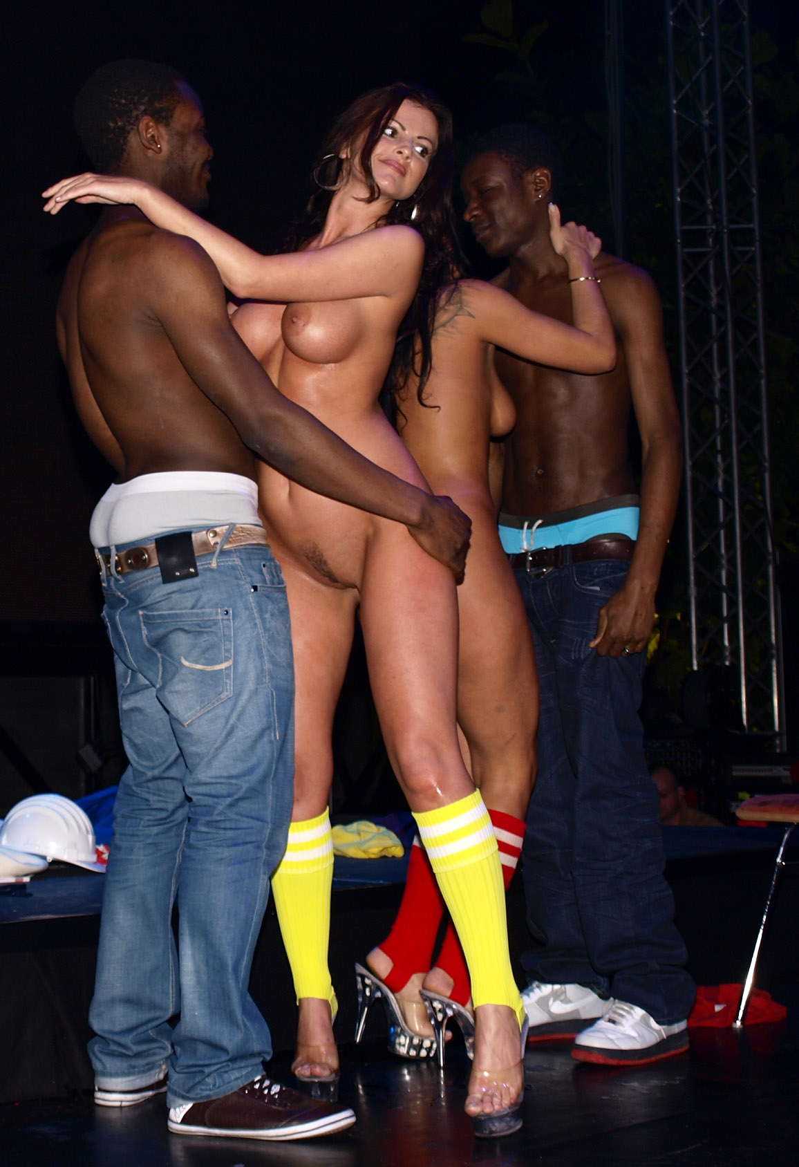 Nude dancing after striptease.